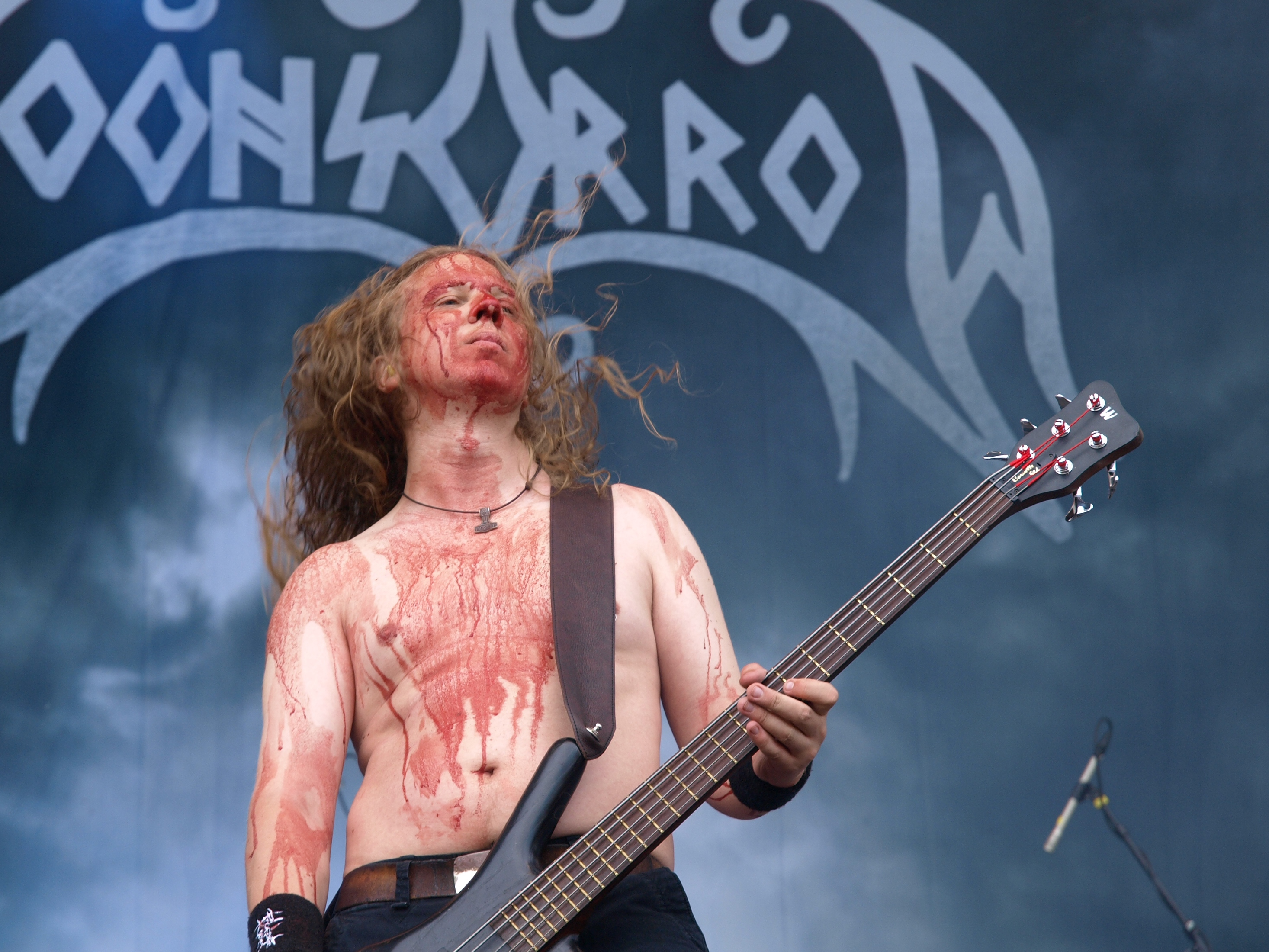 Moonsorrow live am Myötätuulirock 2011